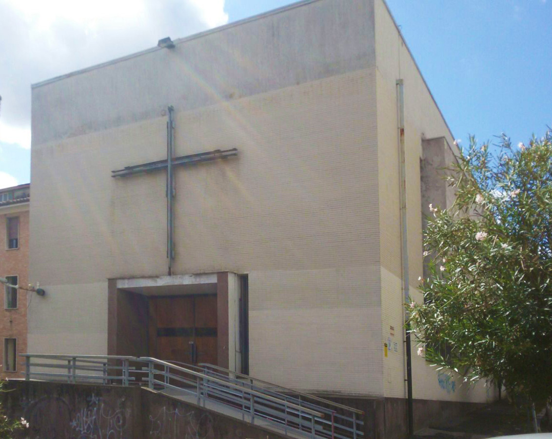 La facciata.